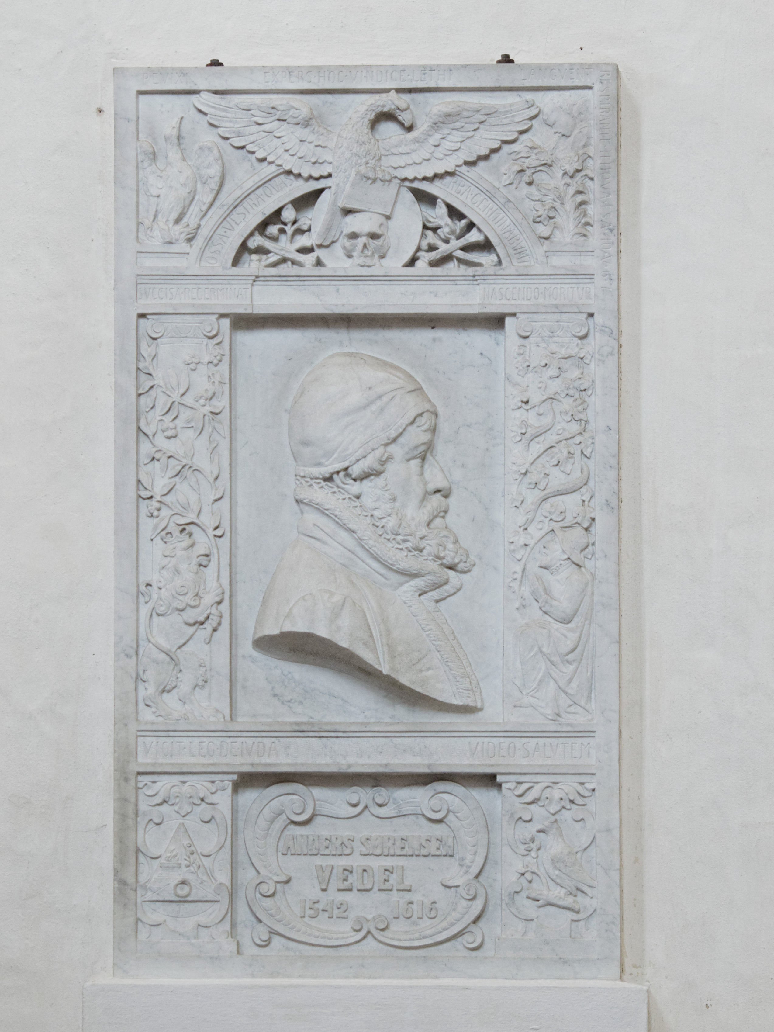 Grabplatte des dänischen Historikers (1542 - 1616) im Dom zu Ribe, Jütland, Dänemark.